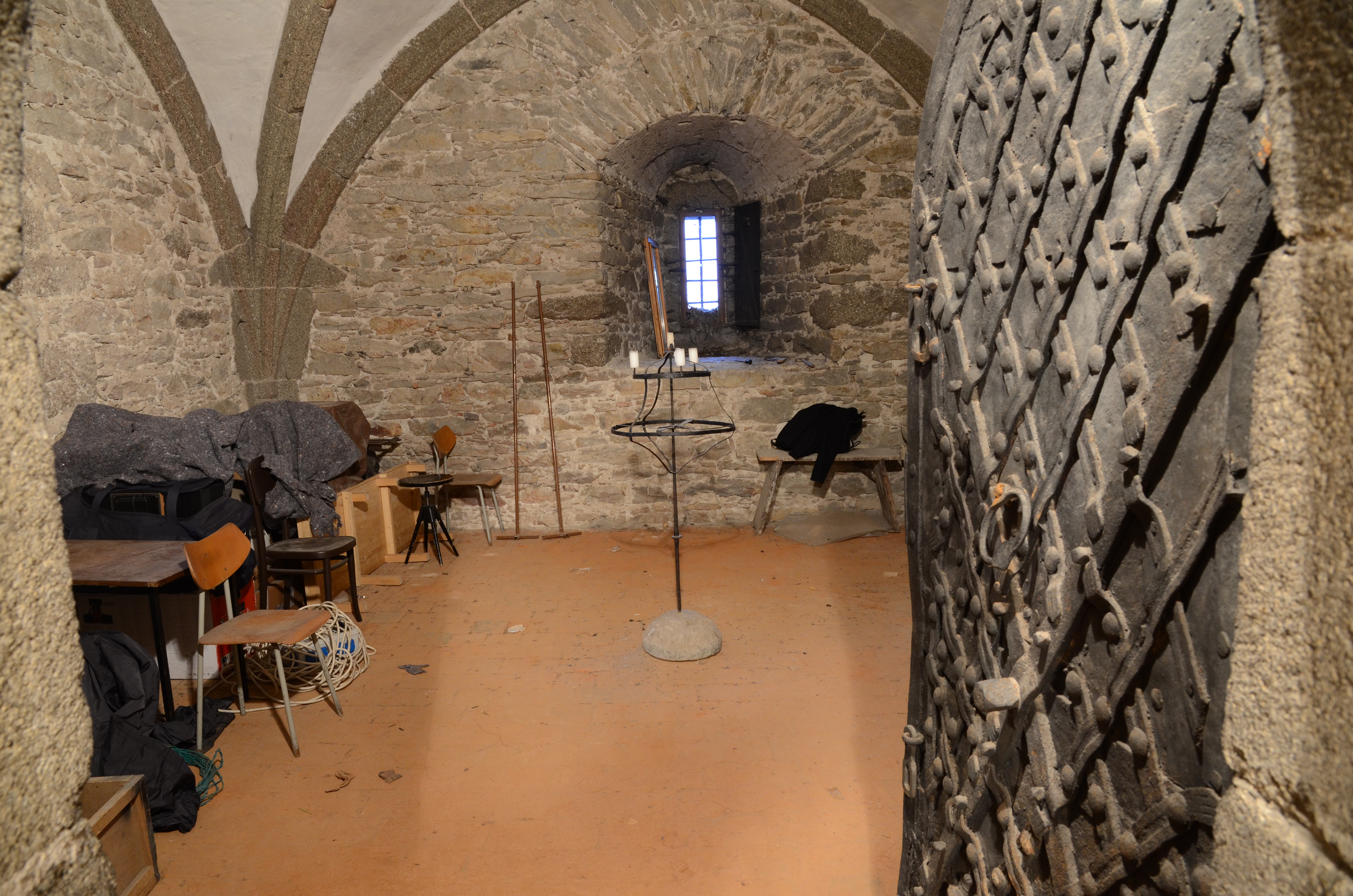 Celkový pohled do komory vší obce v prvním patře městské věže v Třebíči